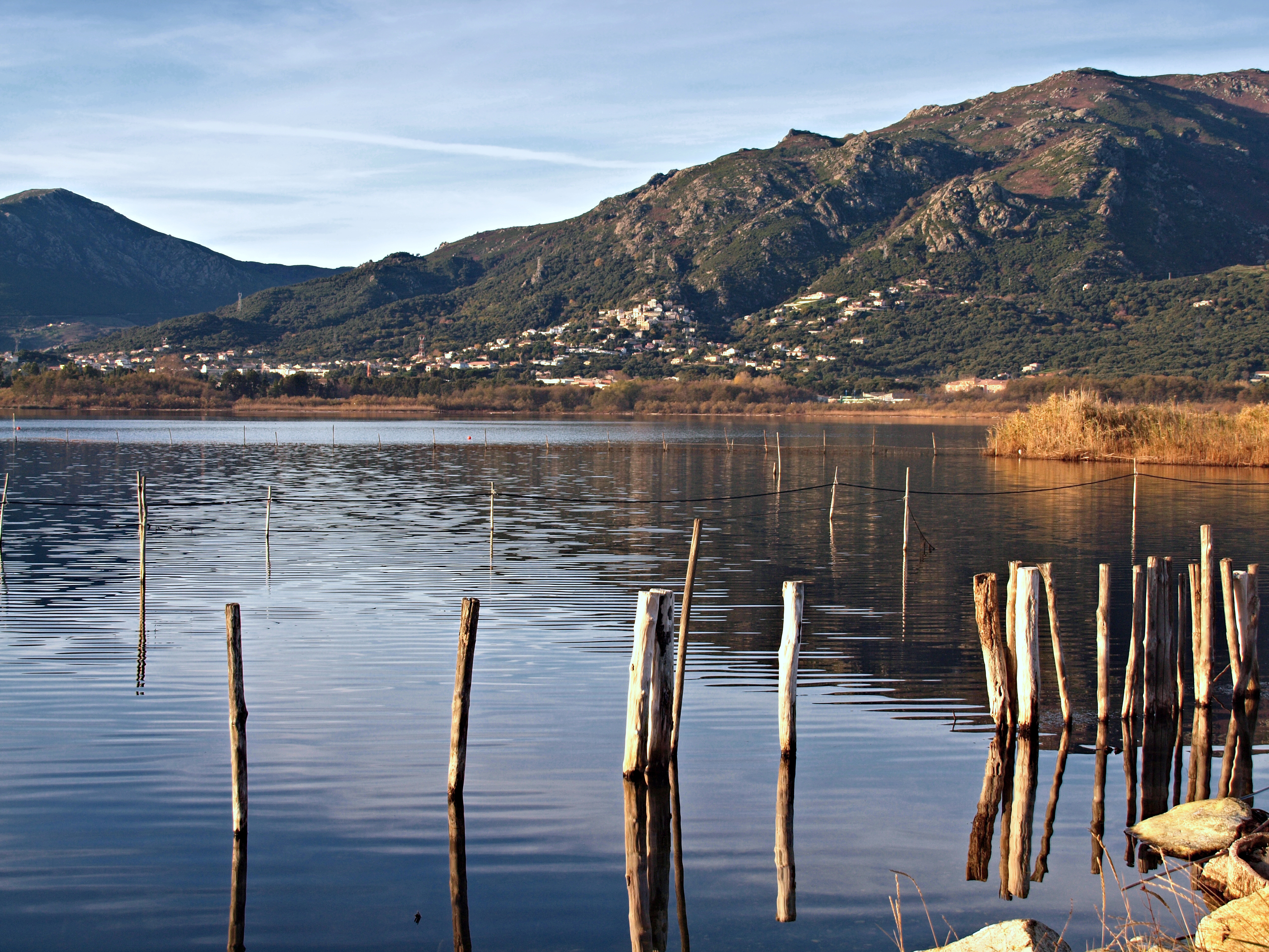 Biguglia - Etang de Biguglia